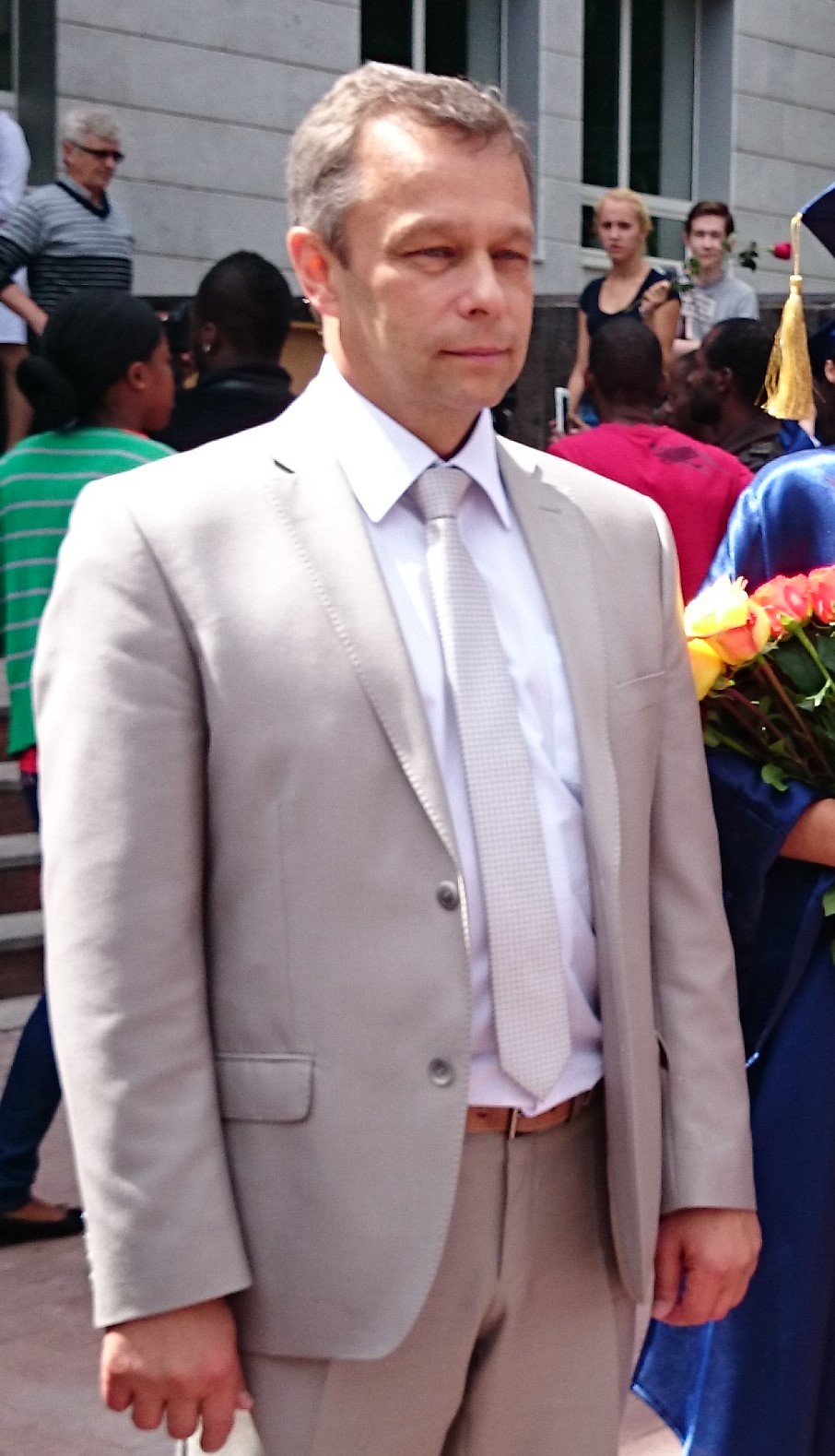 Ректор ЧГУ им. И. Н. Ульянова